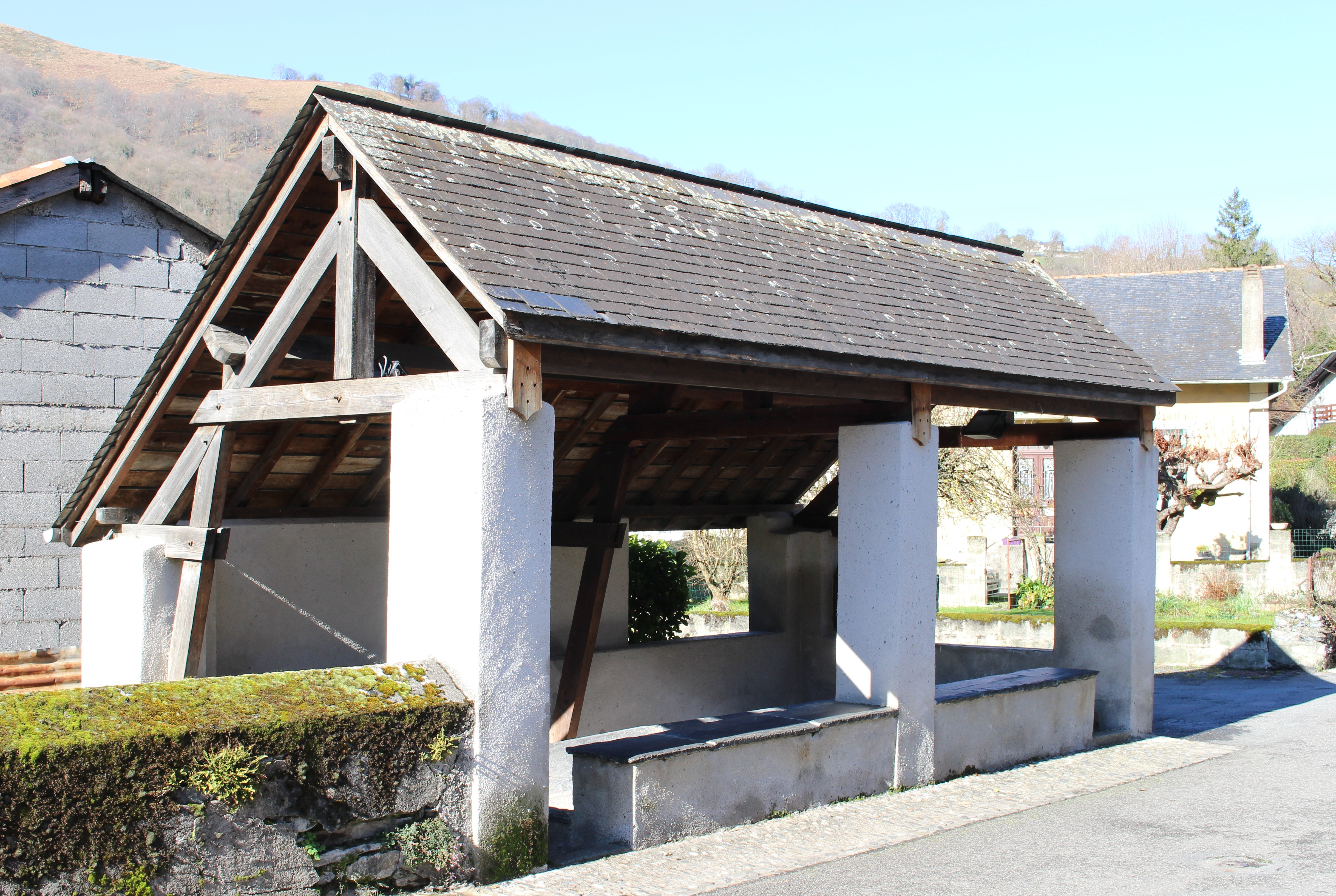 Lavoir de Ger (Hautes-Pyrénées)